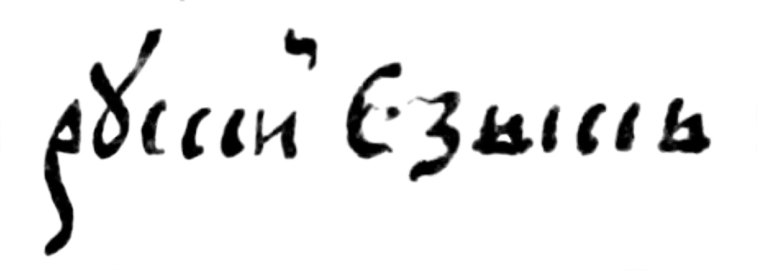 "рүсскій єзыкь"